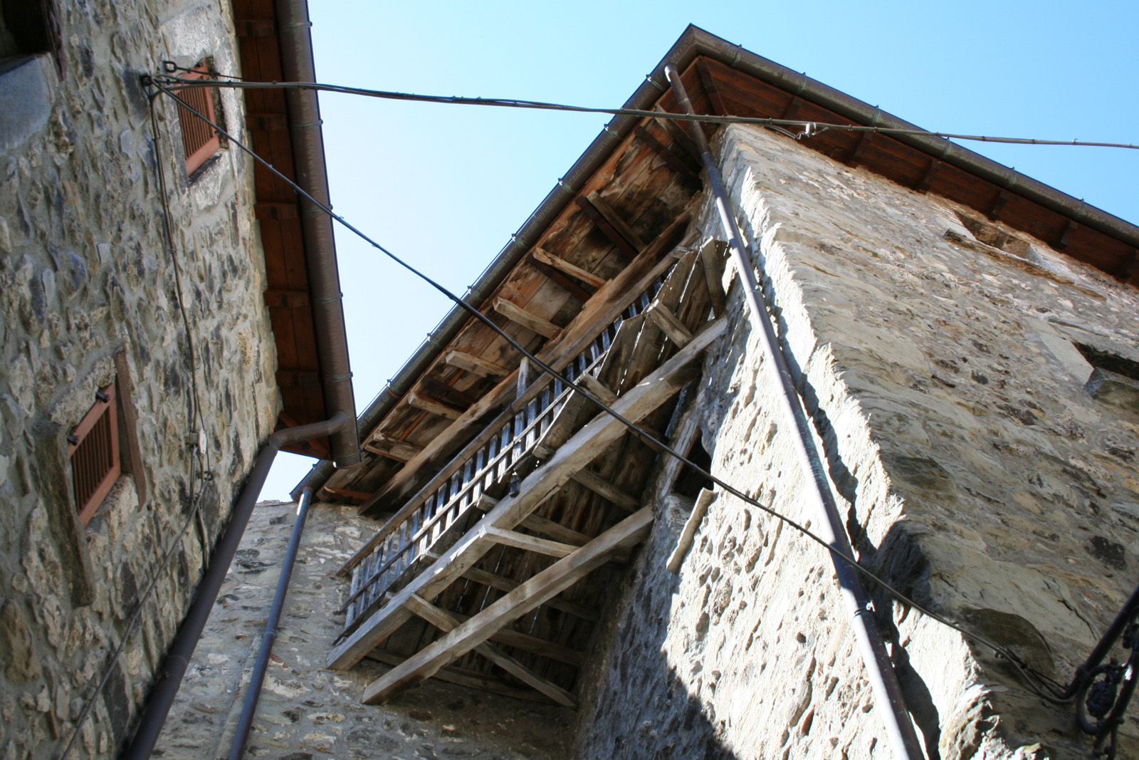 Interno del paese di Pietracamela in provincia di Teramo - Gafio.